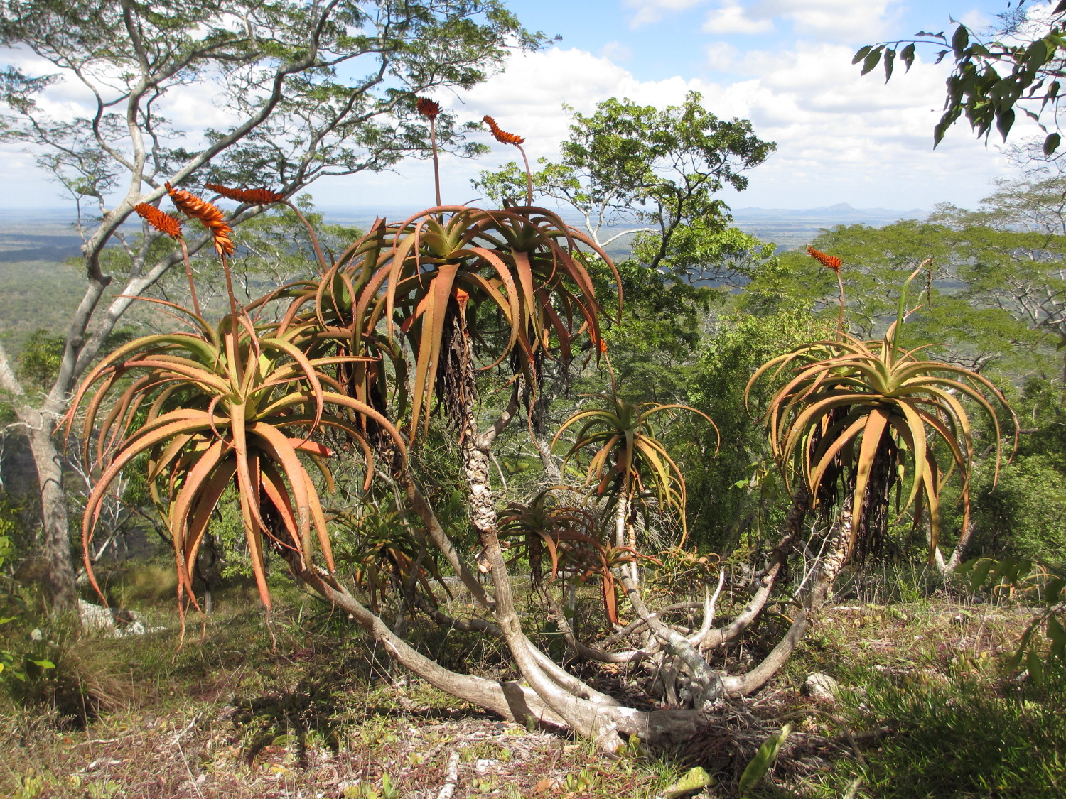 Aloe mawii - shrub